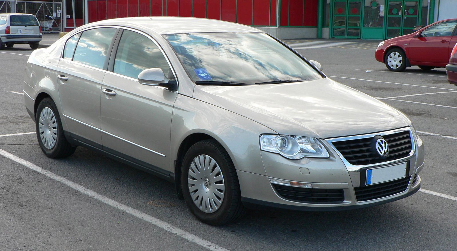 Volkswagen Passat B6